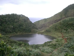 蘭嶼小天池。